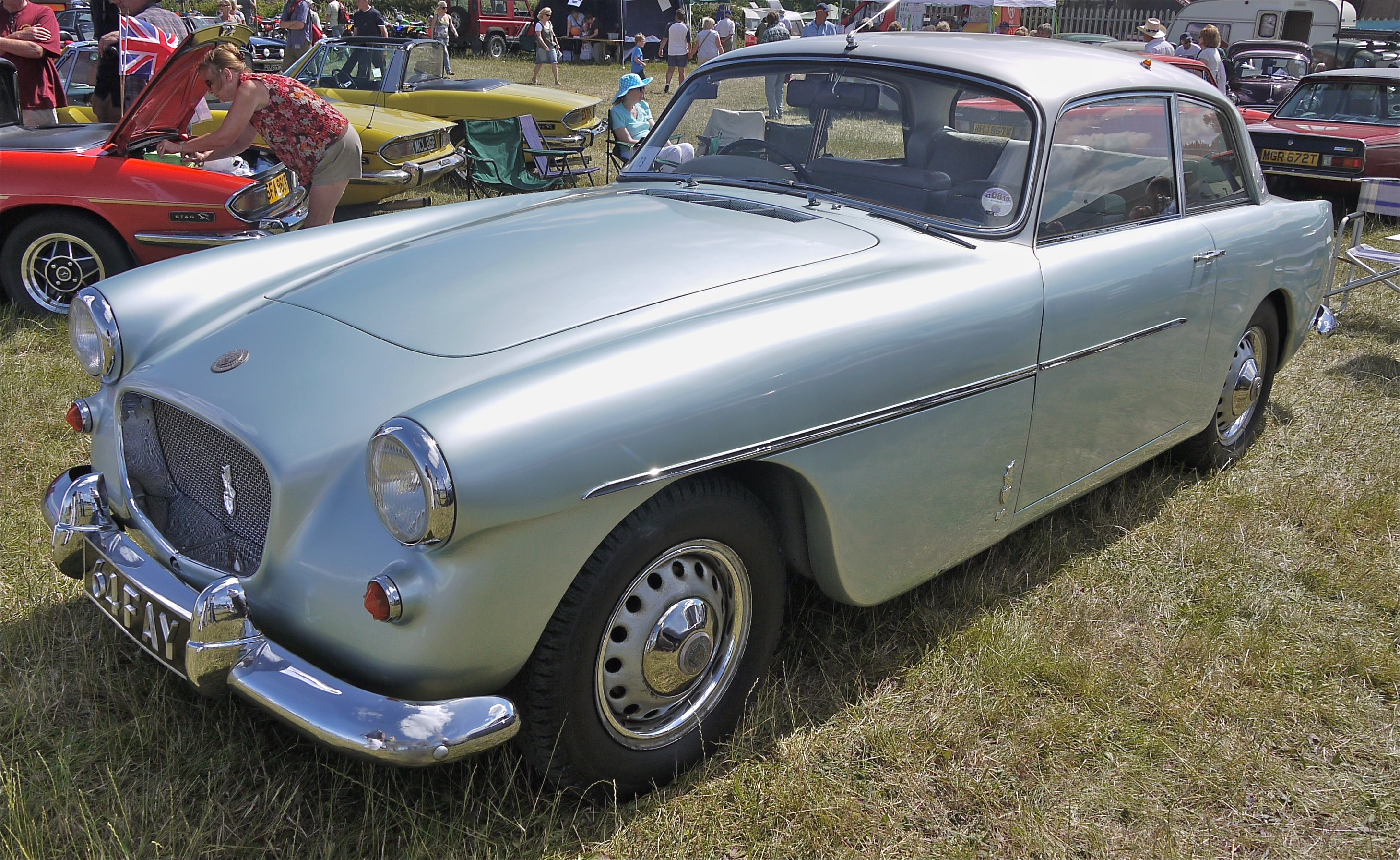 Panasonic G1 14-45 Lens